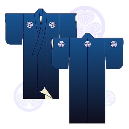 кімоно з 5 мон